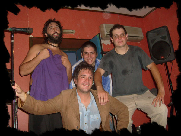 Fizu, Pitu, Niandu y Cerati.